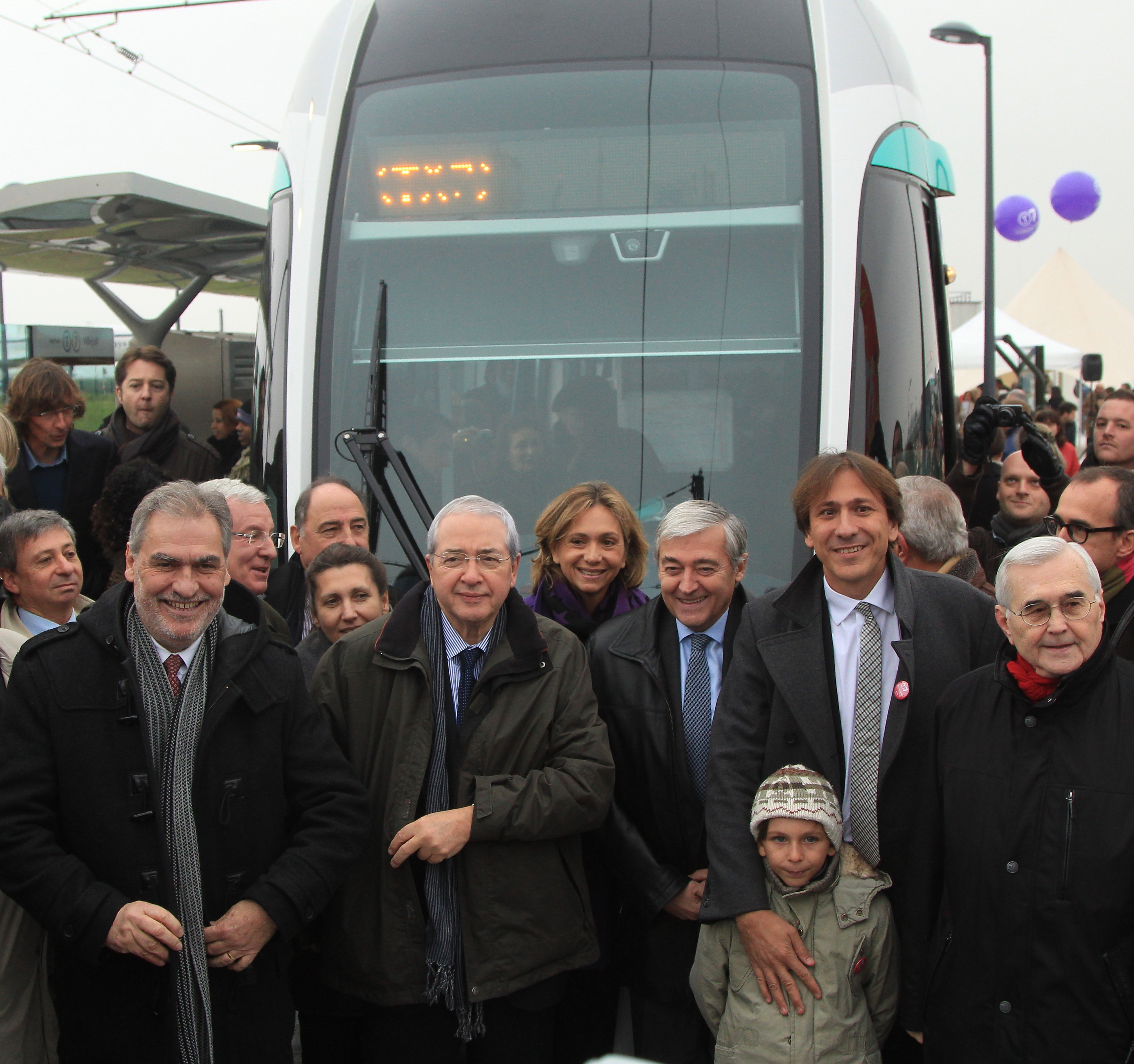 Les officiels posent devant la rame inaugurale du tramway T7 d'Île-de-France avec Christian Favier, Jean-Paul Huchon, Valérie Pécresse, Pierre Mongin et Jérôme Guedj.